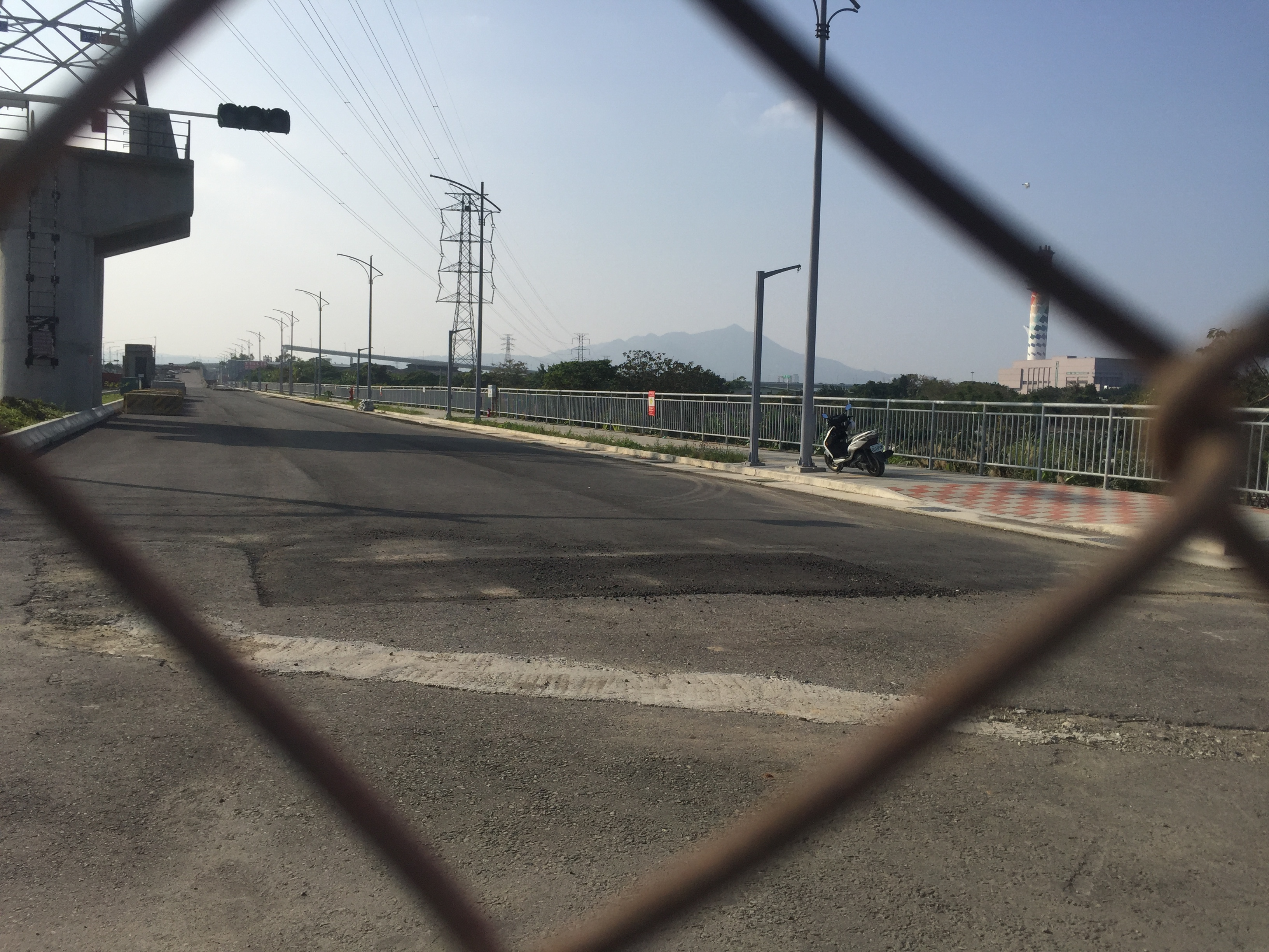 台北市北投區士林北投科技園區新設道路 福國路第二期延伸段 高架地段 延伸至洲美快速道路